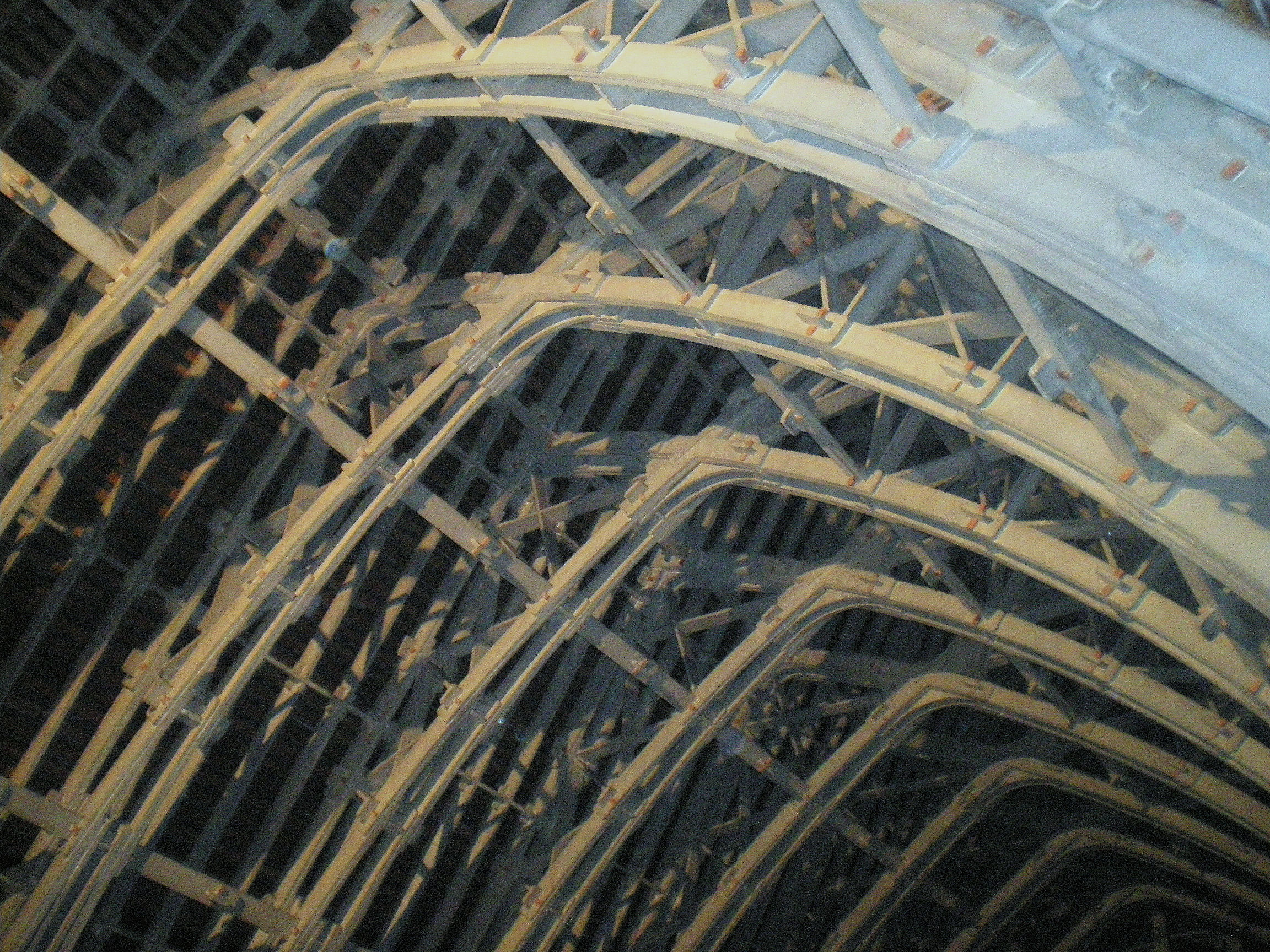 Reims - Cathédrale Notre-Dame - Charpente en ciment armé de Henri Deneux de la toiture